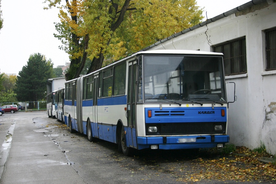 Karosa C744 at SAD Bratislava, 2007-10-27